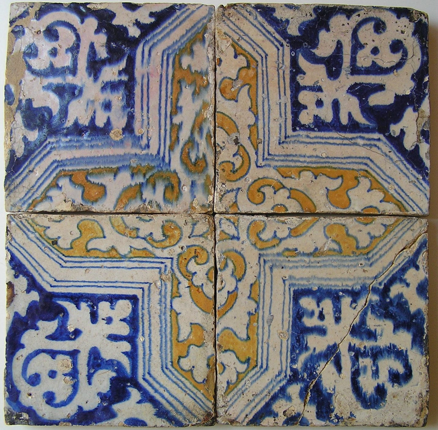 Tegels, polyandreaskruis.